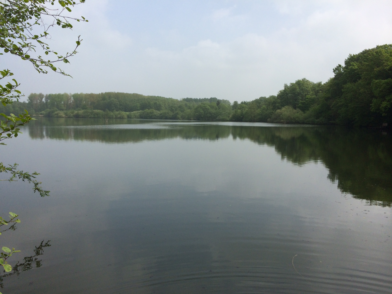 Ententeich im NSG „Auf dem Stein“ in Menden